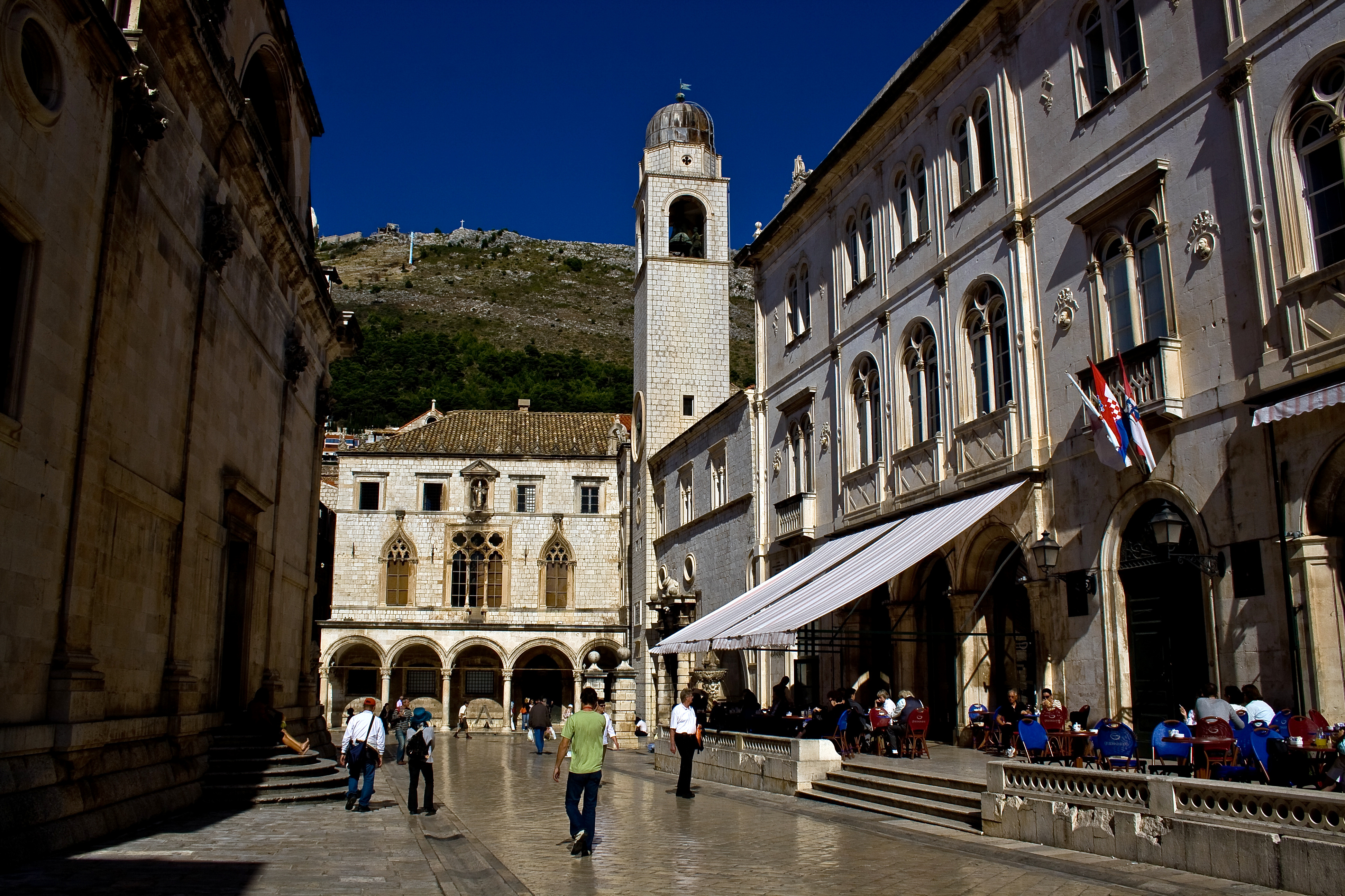 Dubrovnik,_Uhrturm_und_Sponza's_palace